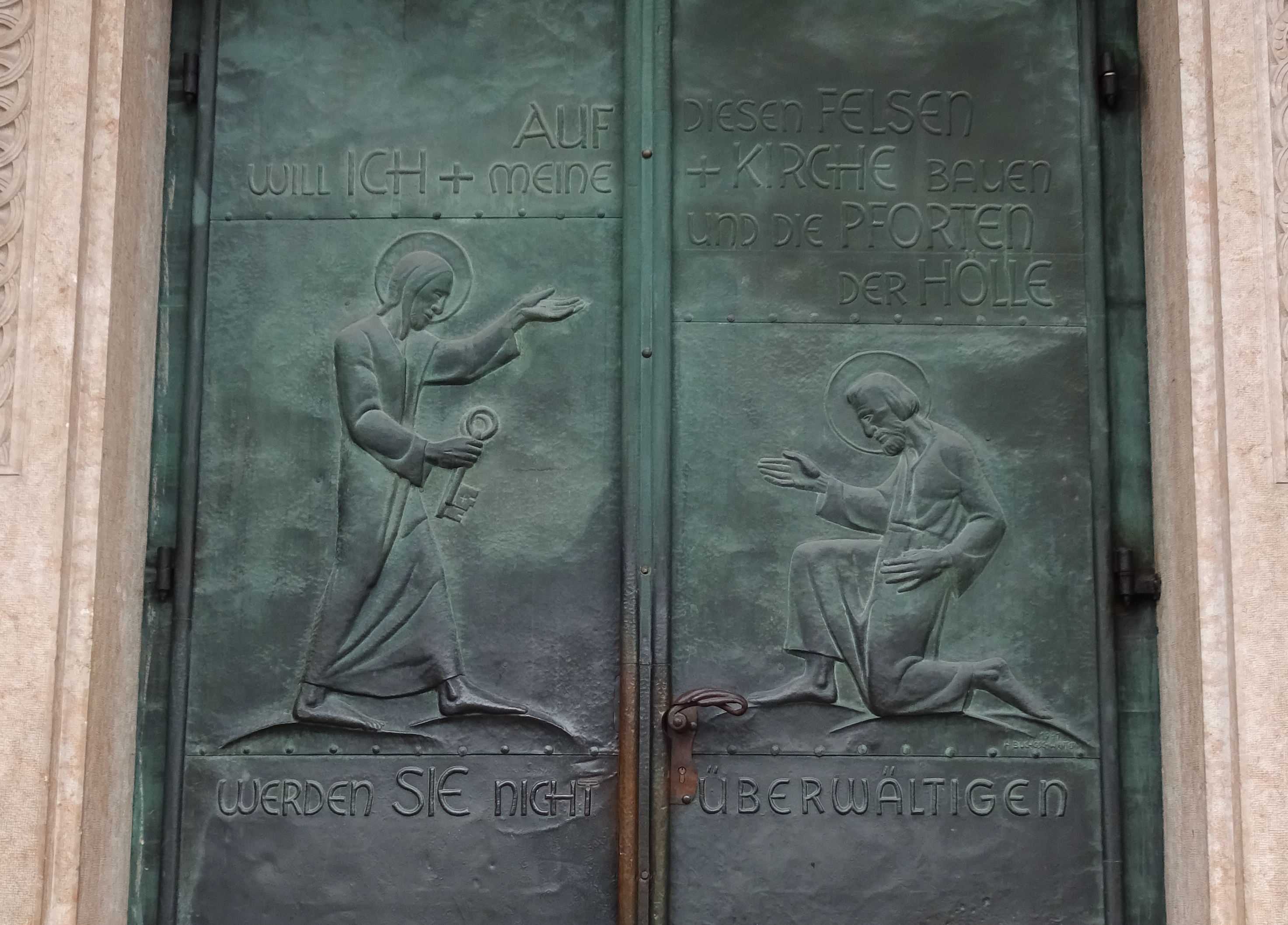 Pfarrkirche Pradl: Hauptportal, Tür mit Kupferrelief "Schlüsselübergabe an Petrus" von Hans Buchgschwenter (1947)